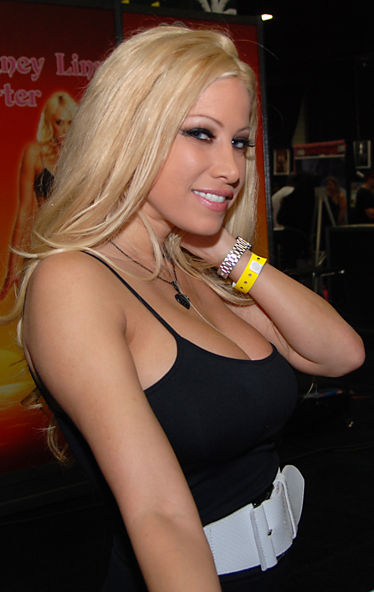 DSC_0965A